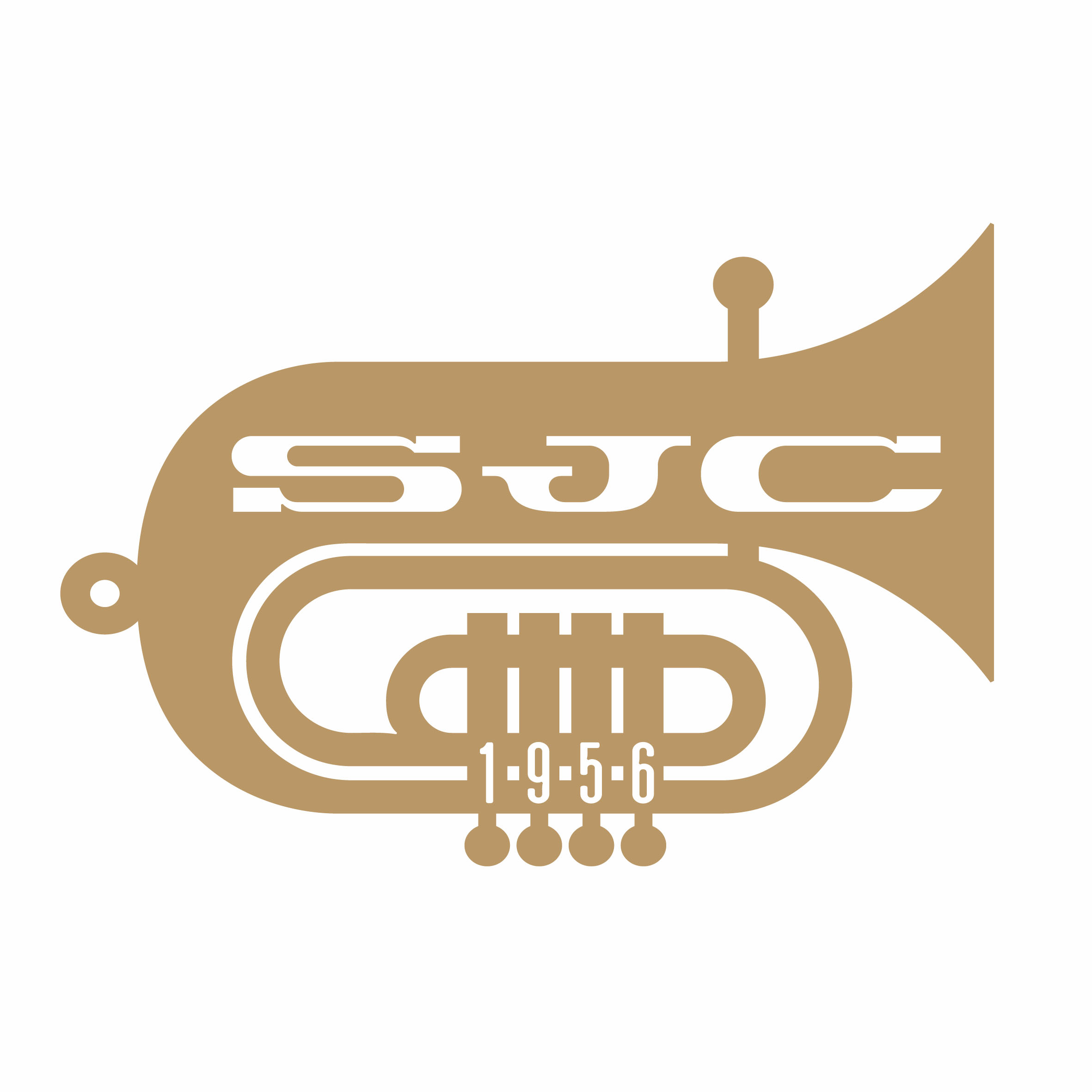 Logotyp Stowarzyszenia Muzycznego Śląski Jazz Club